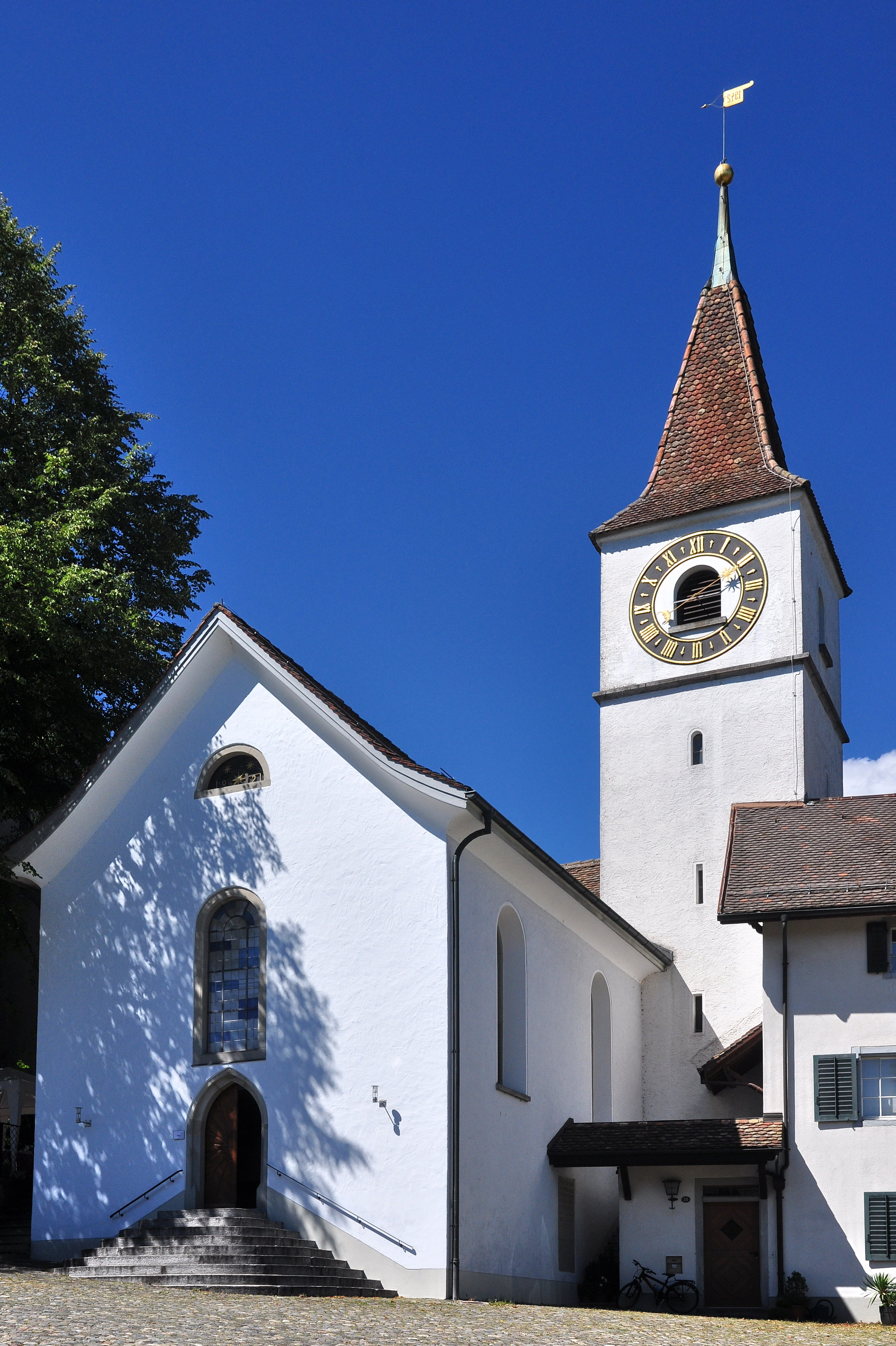 Oberburg in Regensberg (Switzerland)